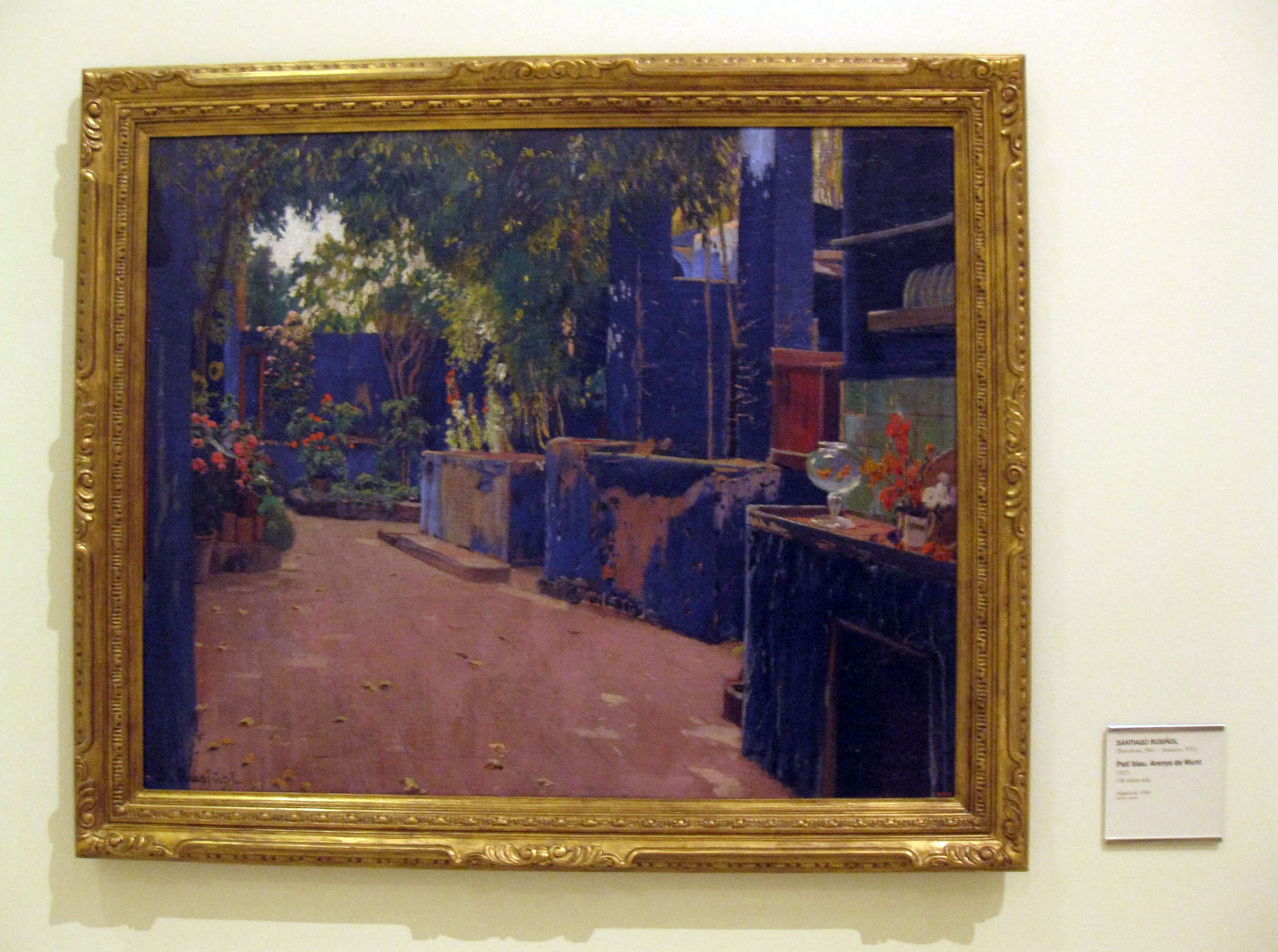 Catalan: Pati blau d'Arenys de Munttitle QS:P1476,ca:"Pati blau d'Arenys de Munt" label QS:Lca,"Pati blau d'Arenys de Munt"